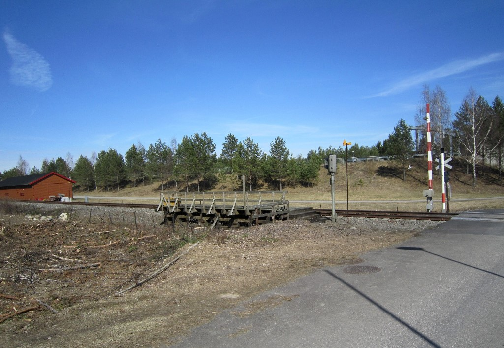 Grundsetmoen holdeplass på Rørosbanen i 2014